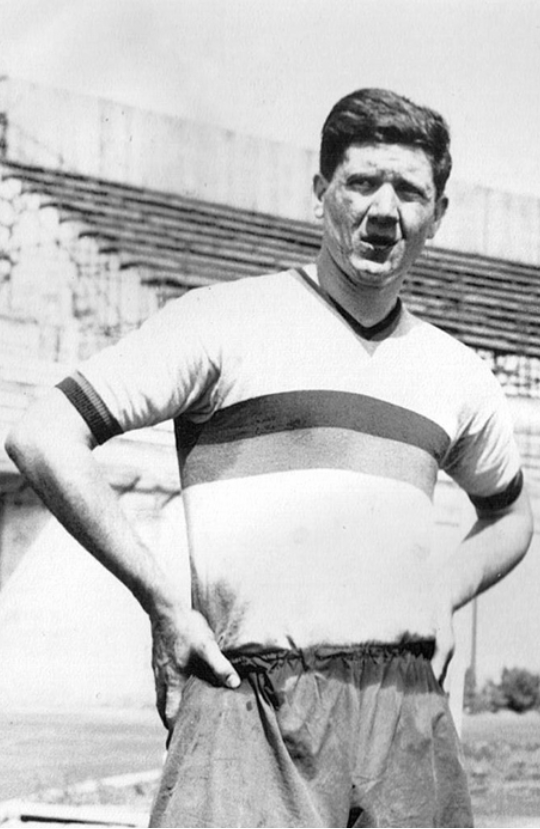 Horst Szymaniak en la temporada 1961-62